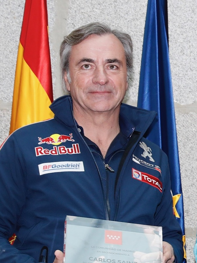 Hoy rendimos un merecido homenaje a Carlos Sainz y Lucas Cruz , ganadores del durísimo Dakar 2018 y dos figuras extraordinarias del mundo del motor. La victoria en el Dakar 2018 es una magnífica ocasión para darnos cuenta de lo lejos que pueden llegar un madrileño y un catalán, trabajando en equipo. Carlos Sainz y Lucas Cruz son un ejemplo y representan los mejores valores del deporte.